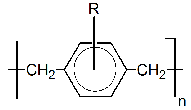 Замещённый поли-п-ксилилен